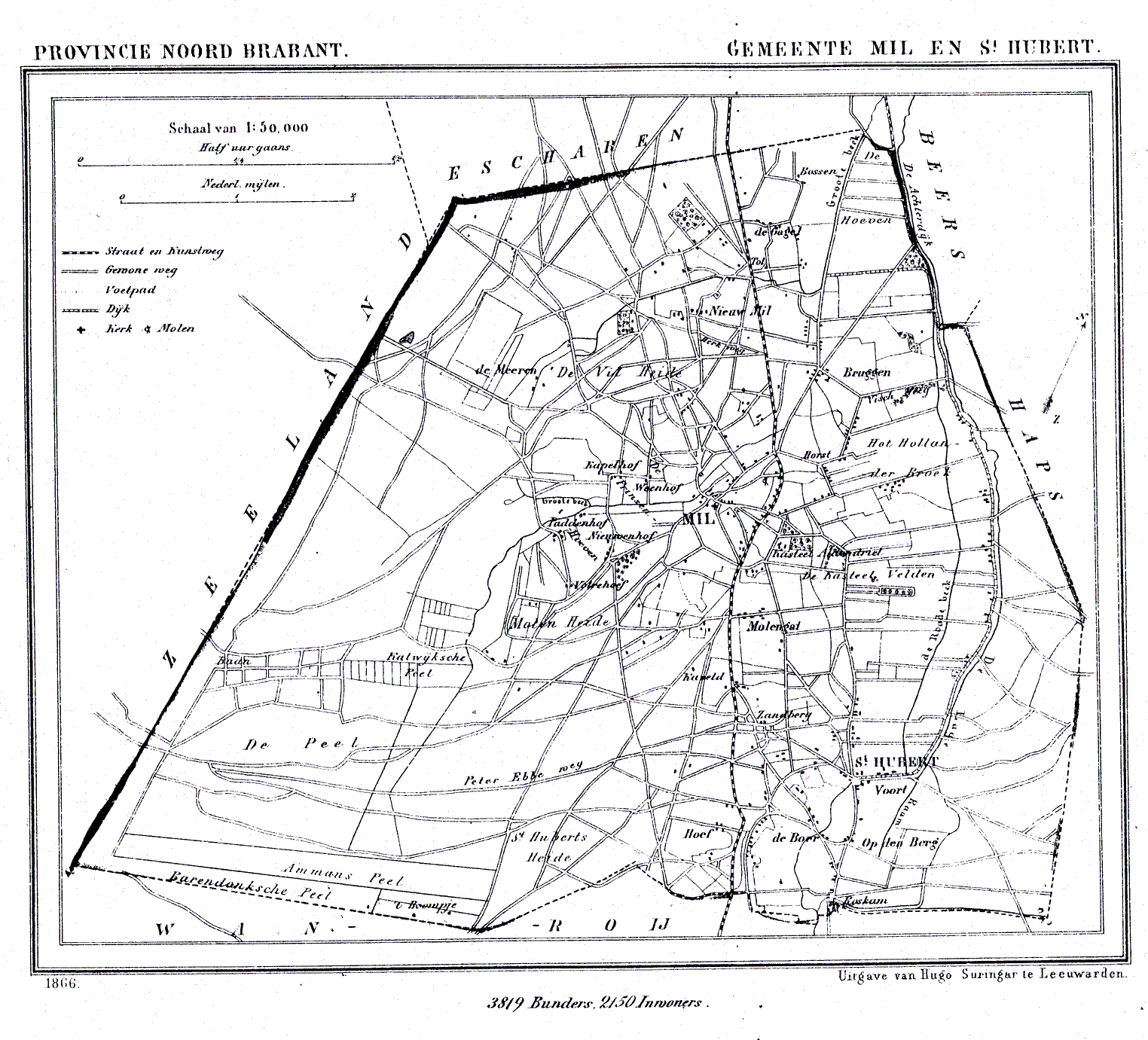 Nederland, Noord-Brabant, Gemeente Mill